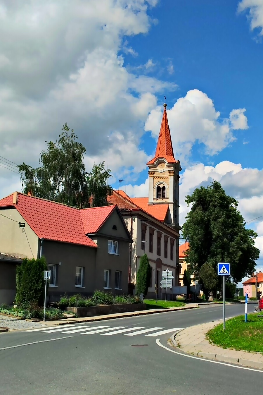 Kostel sv. Cyrila a Metoděje (Zlobice), Zlobice